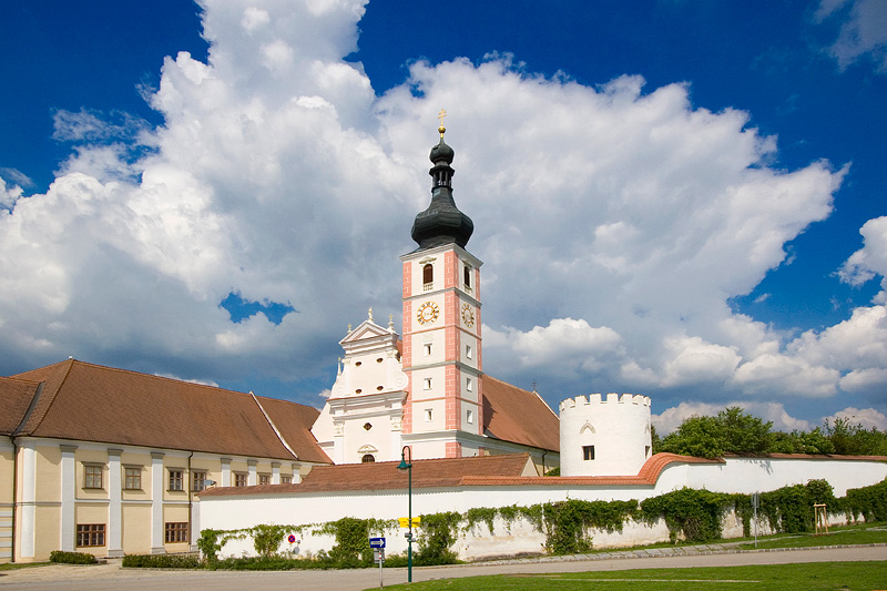 Stift Geras